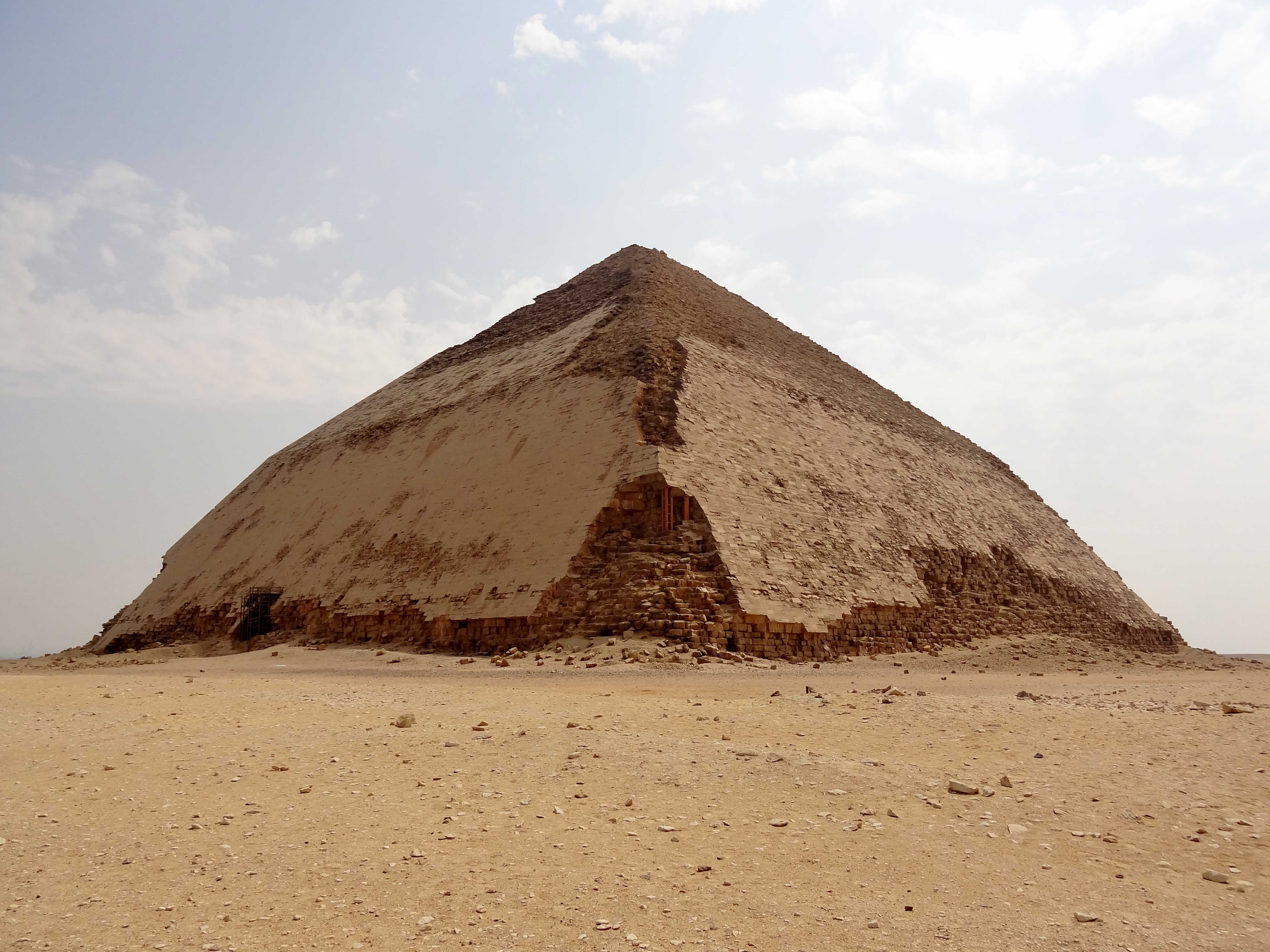 Knickpyramide von Dahschur, Ägypten